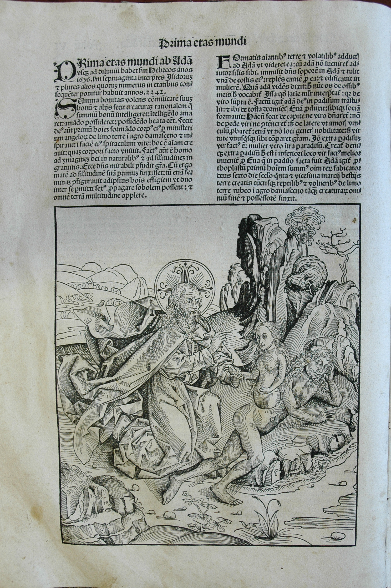 Imagen del Liber Chronicarum, incunable publicado por Hartmannus Schedel